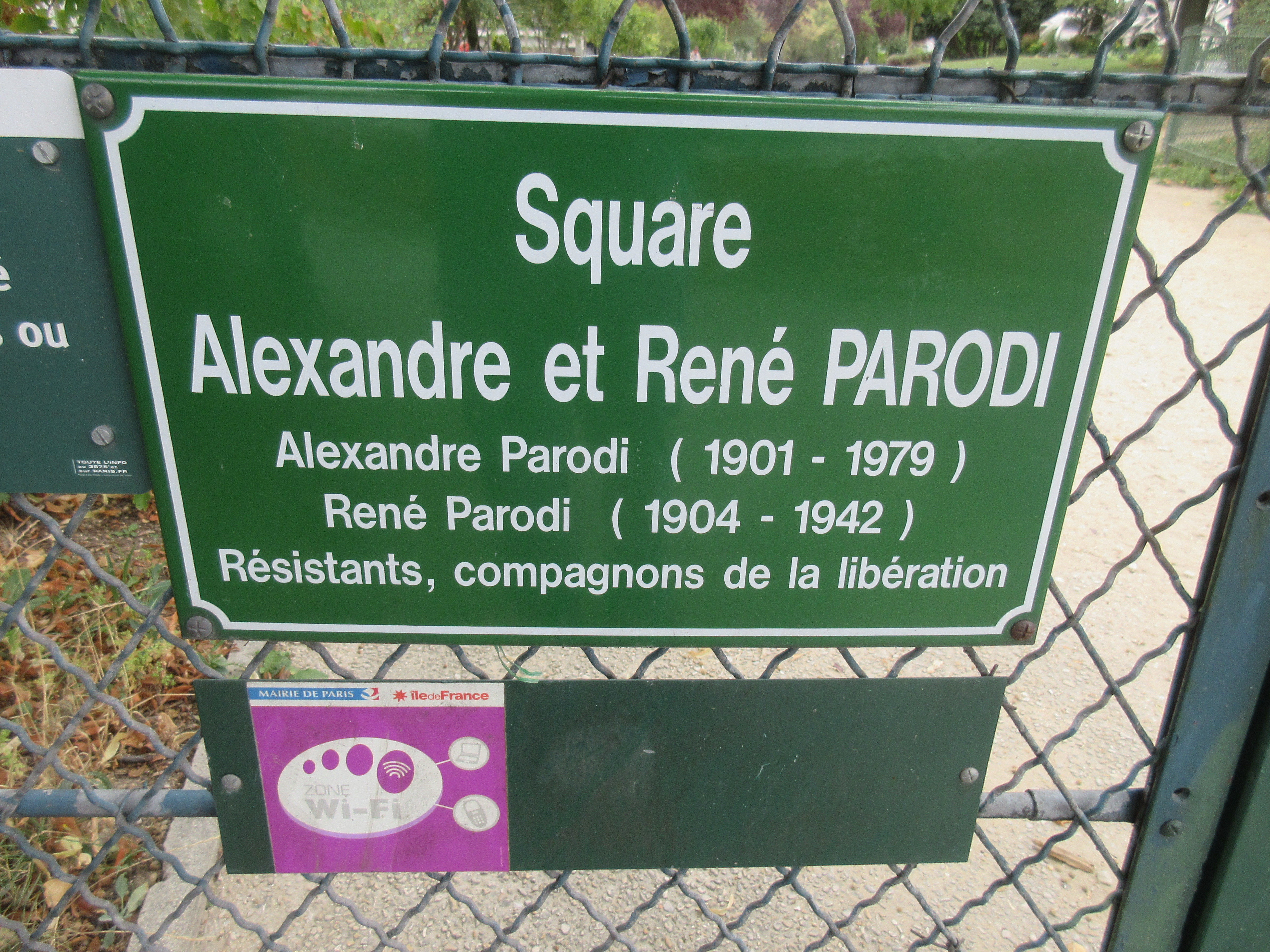 Plaque du square Alexandre et René Parodi, Paris